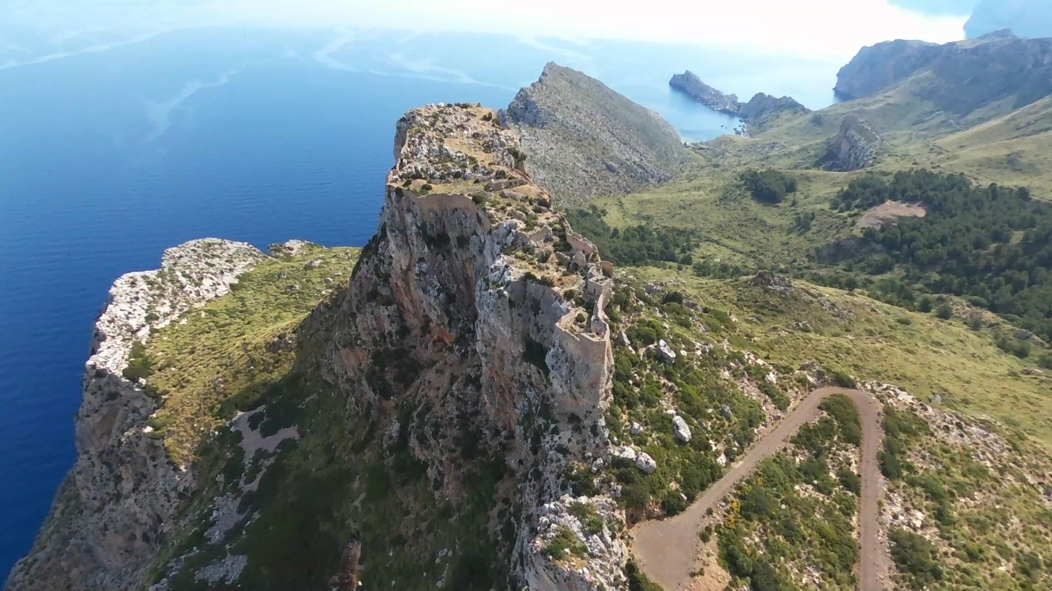 Castillo del Rey, Pollensa, Mallorca, desde el suroeste.